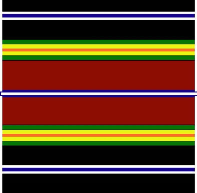 Neihsial Traditional Attire